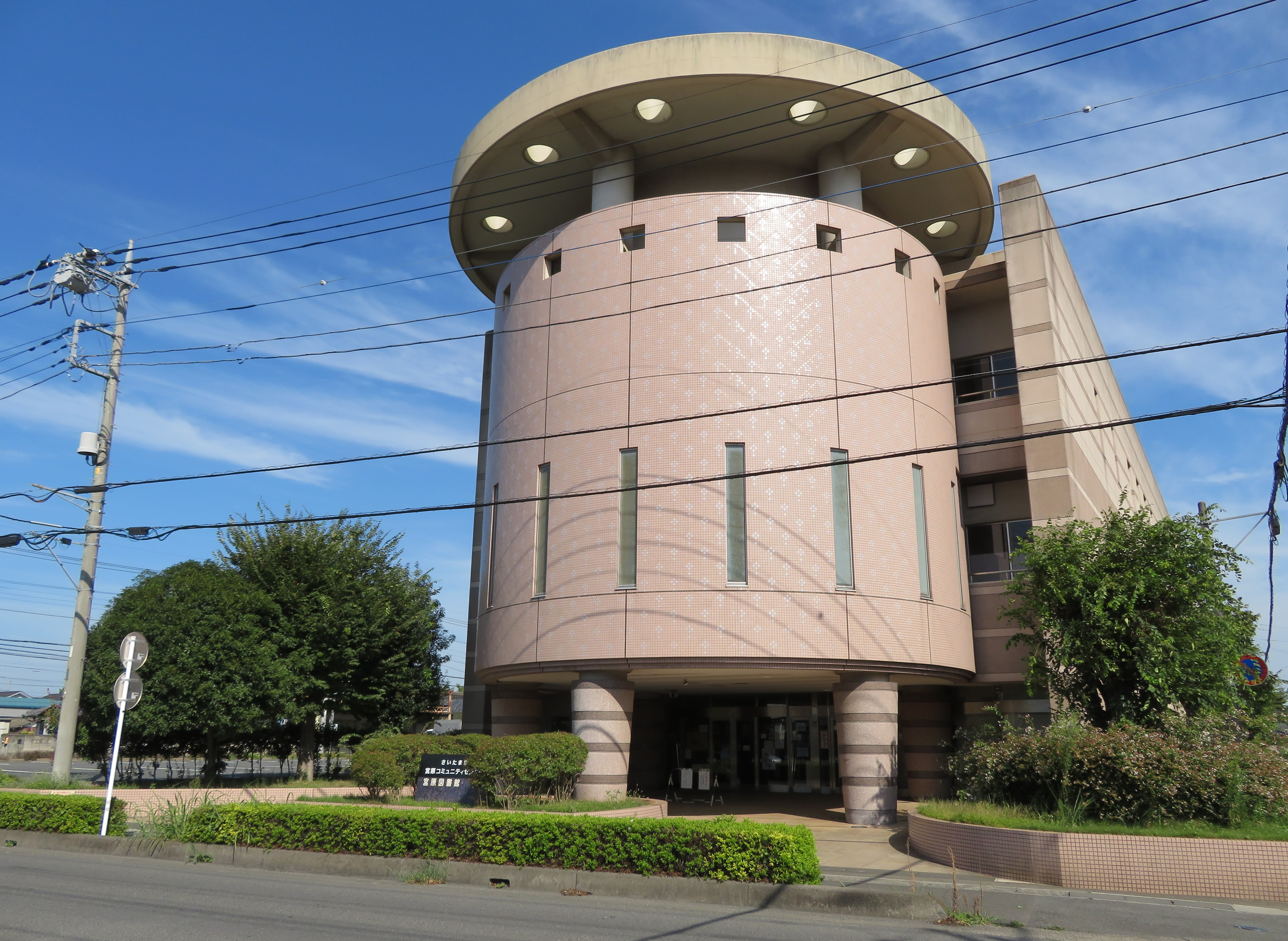 さいたま市宮原コミュニティーセンター建物 Canon PowerShot SX720 HS